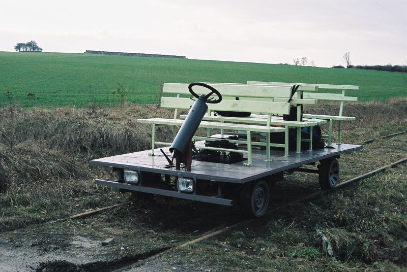 drezyna motorowa Krzywińskiej Kolei Drezynowej zbudowana w oparciu o napęd z samochodu Fiat 126p